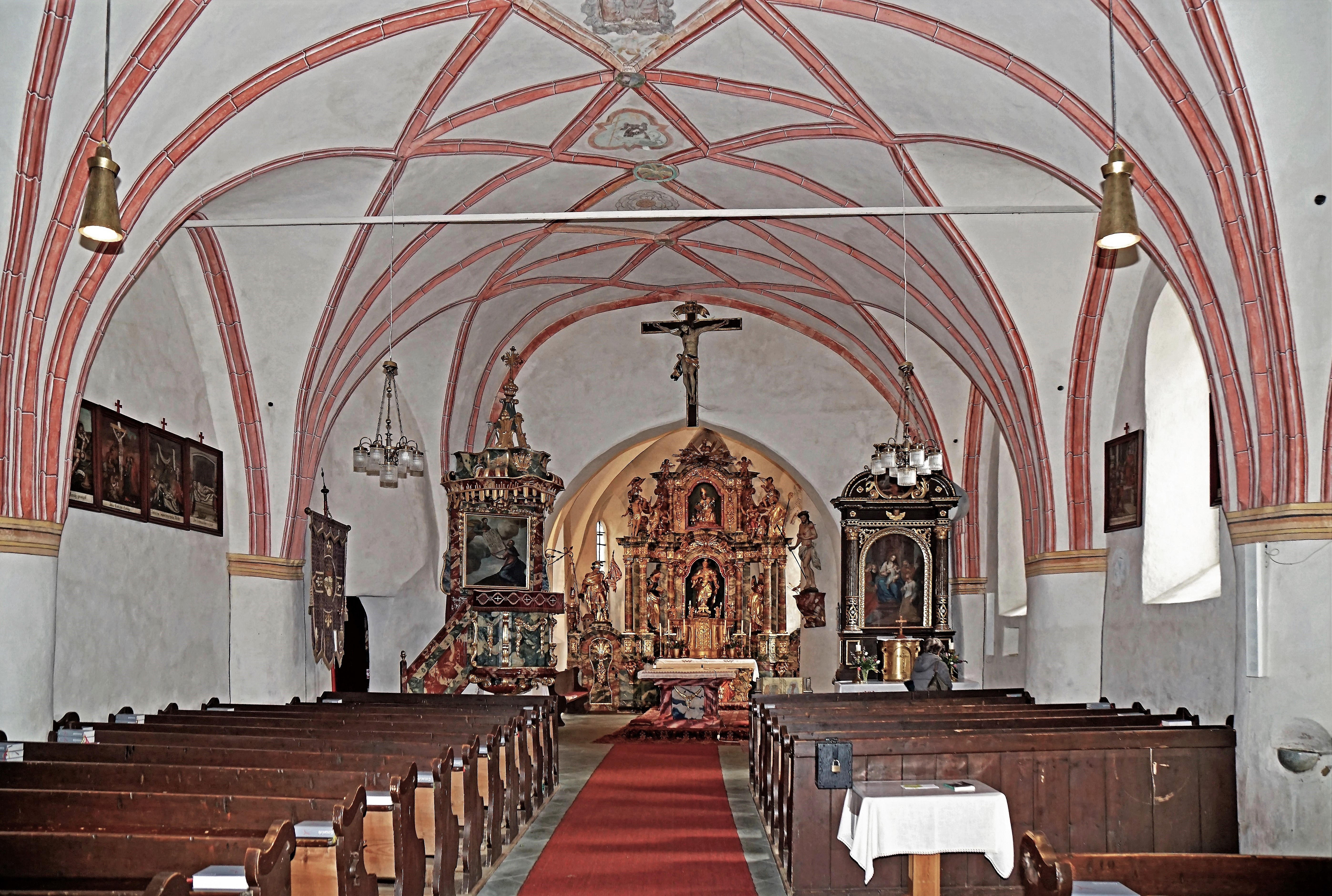 Kath. Pfarrkirche Hl. Margareta (Glödnitz), Innenansicht